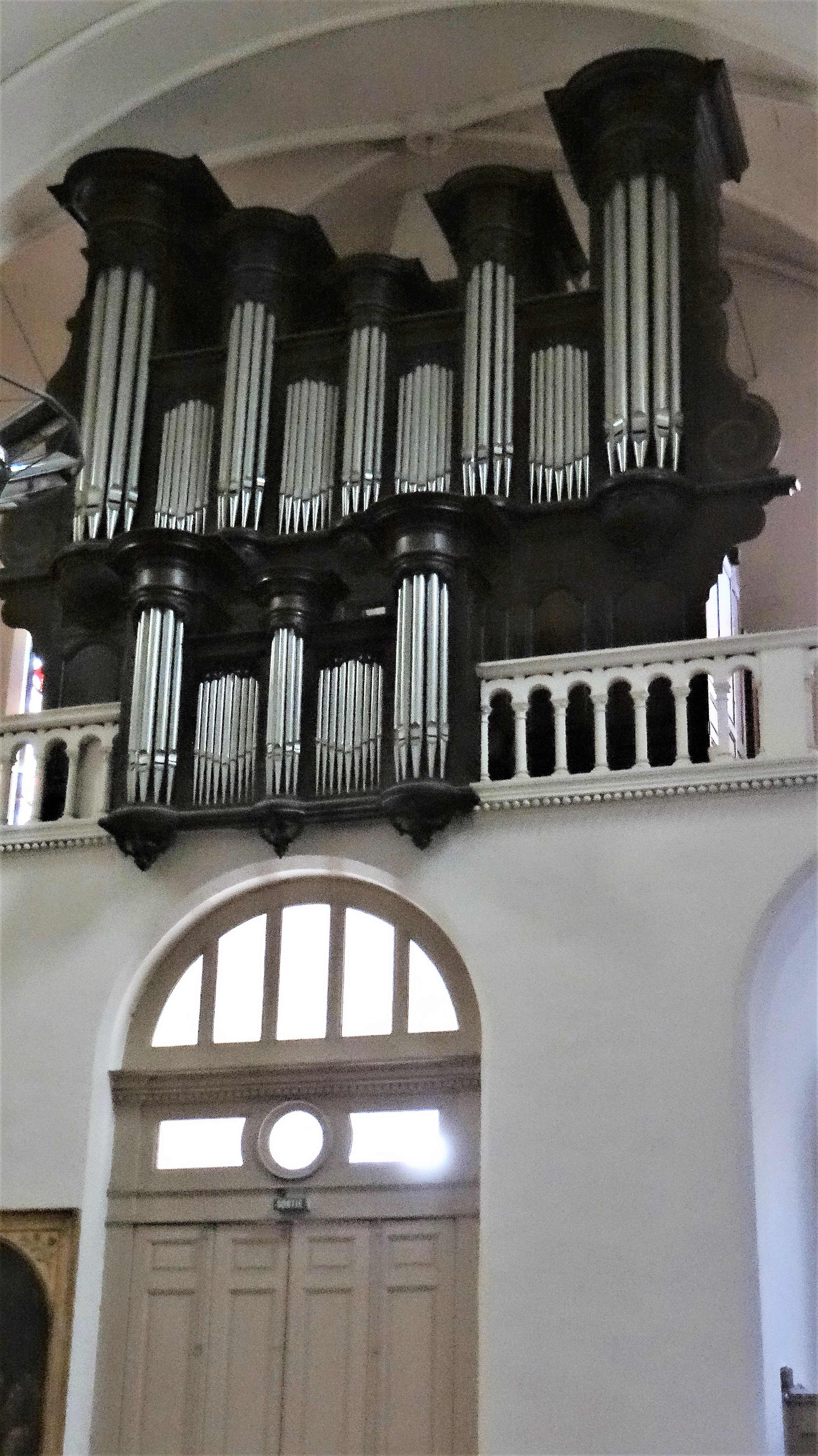 Sorèze - Église Notre-Dame-de-la-Paix - Orgue : buffet remontant à l'orgue de Pierre de Montbrun en 1735 pour l'abbaye bénédictine de Sorèze, transféré avec reconstruction de la partie instrumentale par Thiébaut Maucourt en 1866, restauré en 1999 par Alain Sals et Charles Henry.